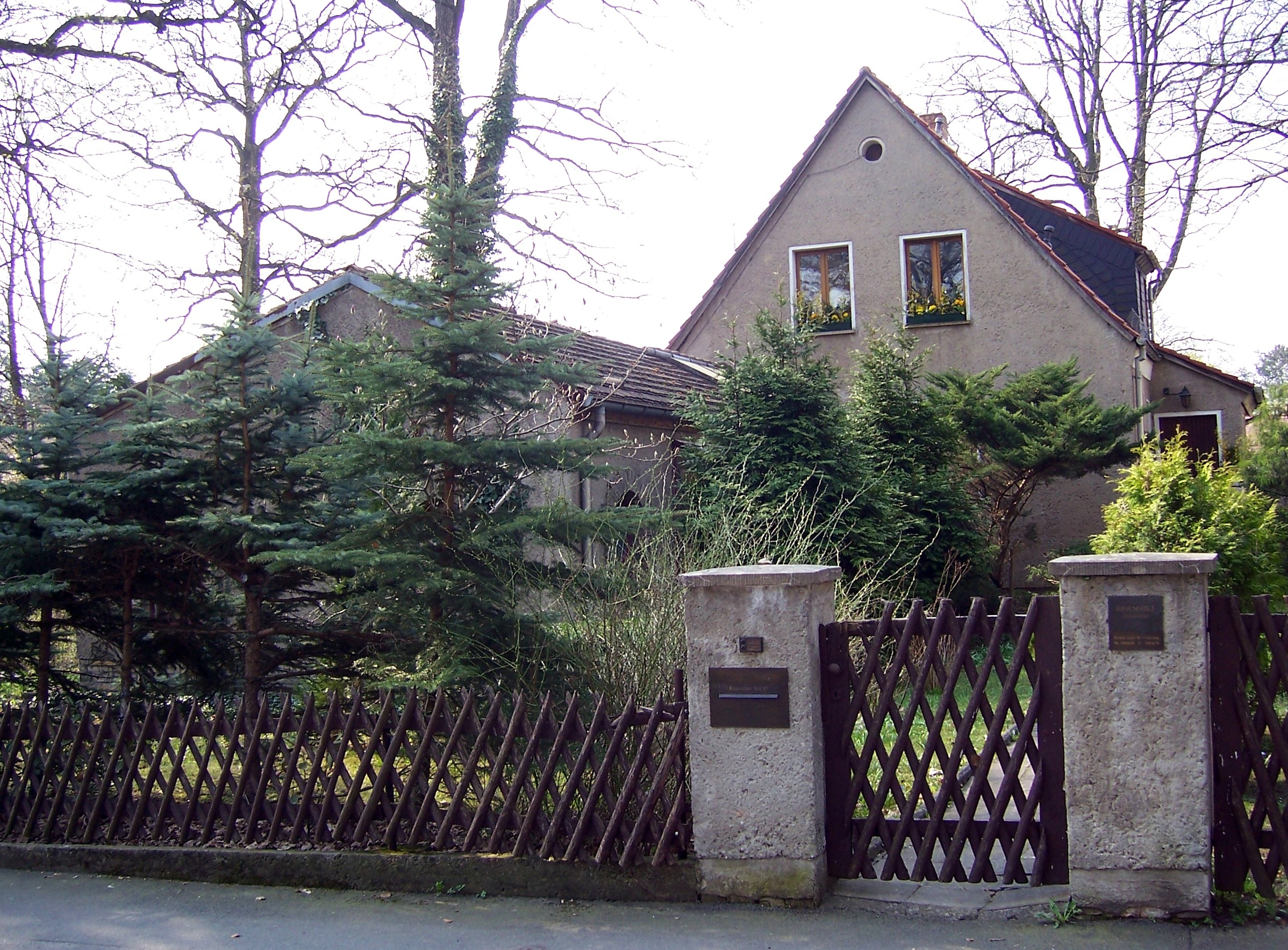 Wohnhaus des Malers Rudolf Nehmer in Dresden-Klotzsche.